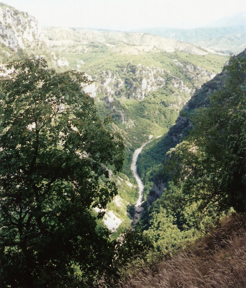 vicos gorge ,zagory, greece